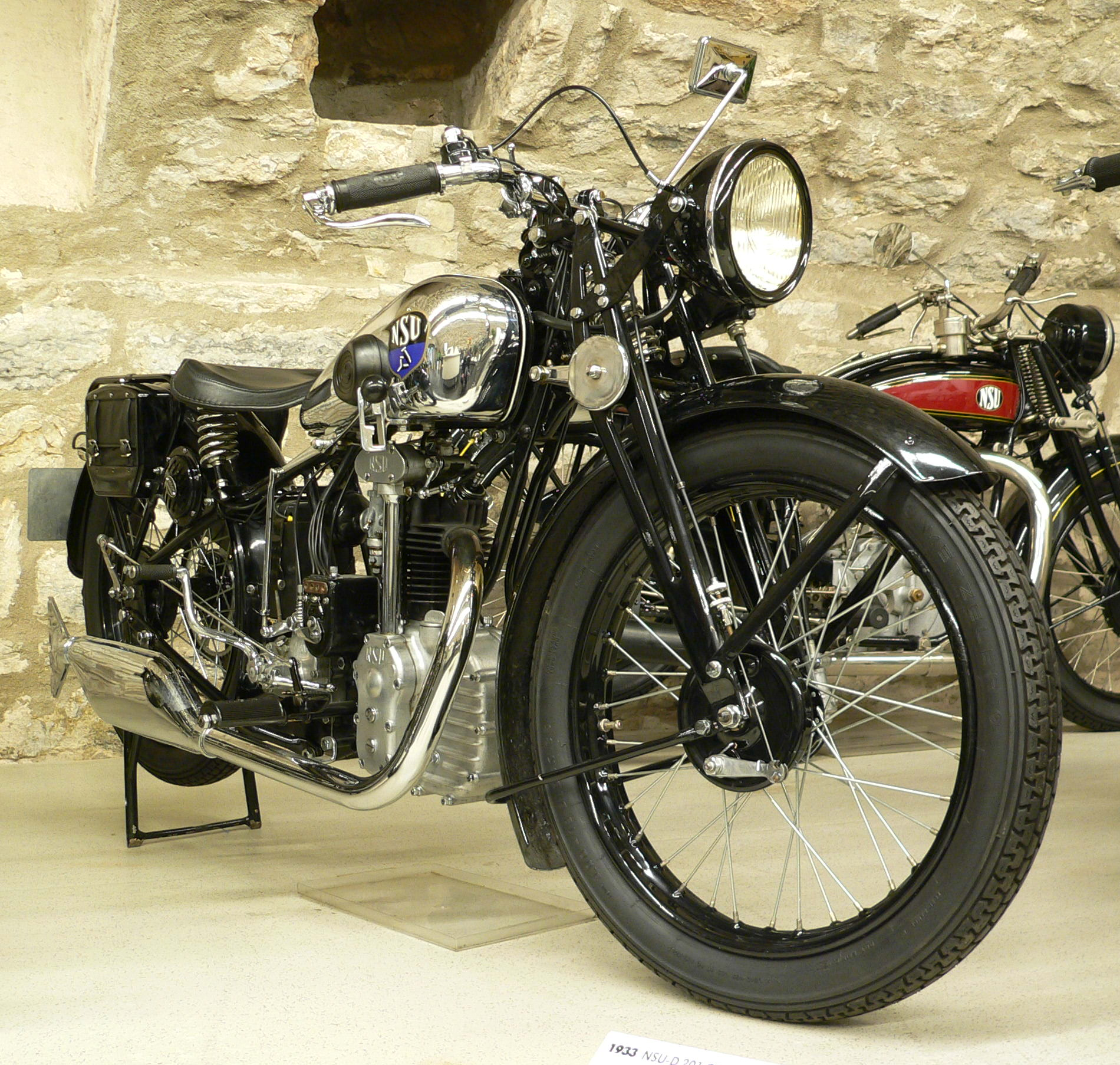 Motorbike "NSU-D 201 OSL" (1933) at the Deutsches Zweirad- und NSU-Museum